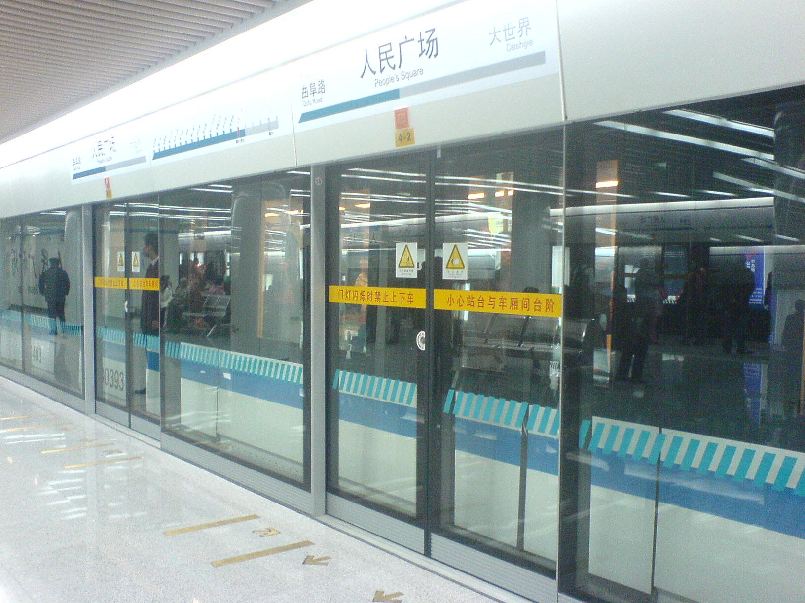 人民广场站站台与8号线列车